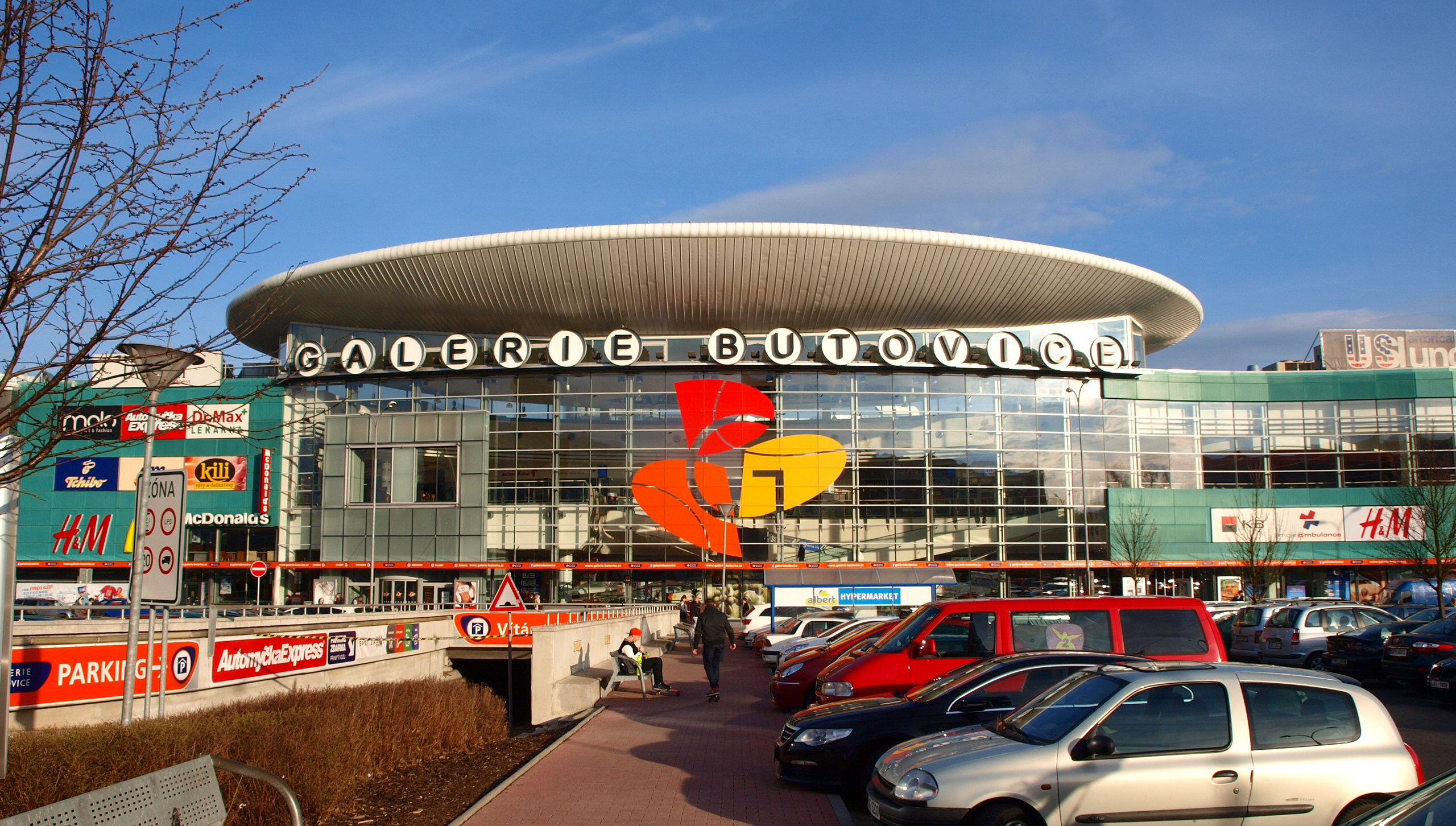 Galerie Nové Butovice